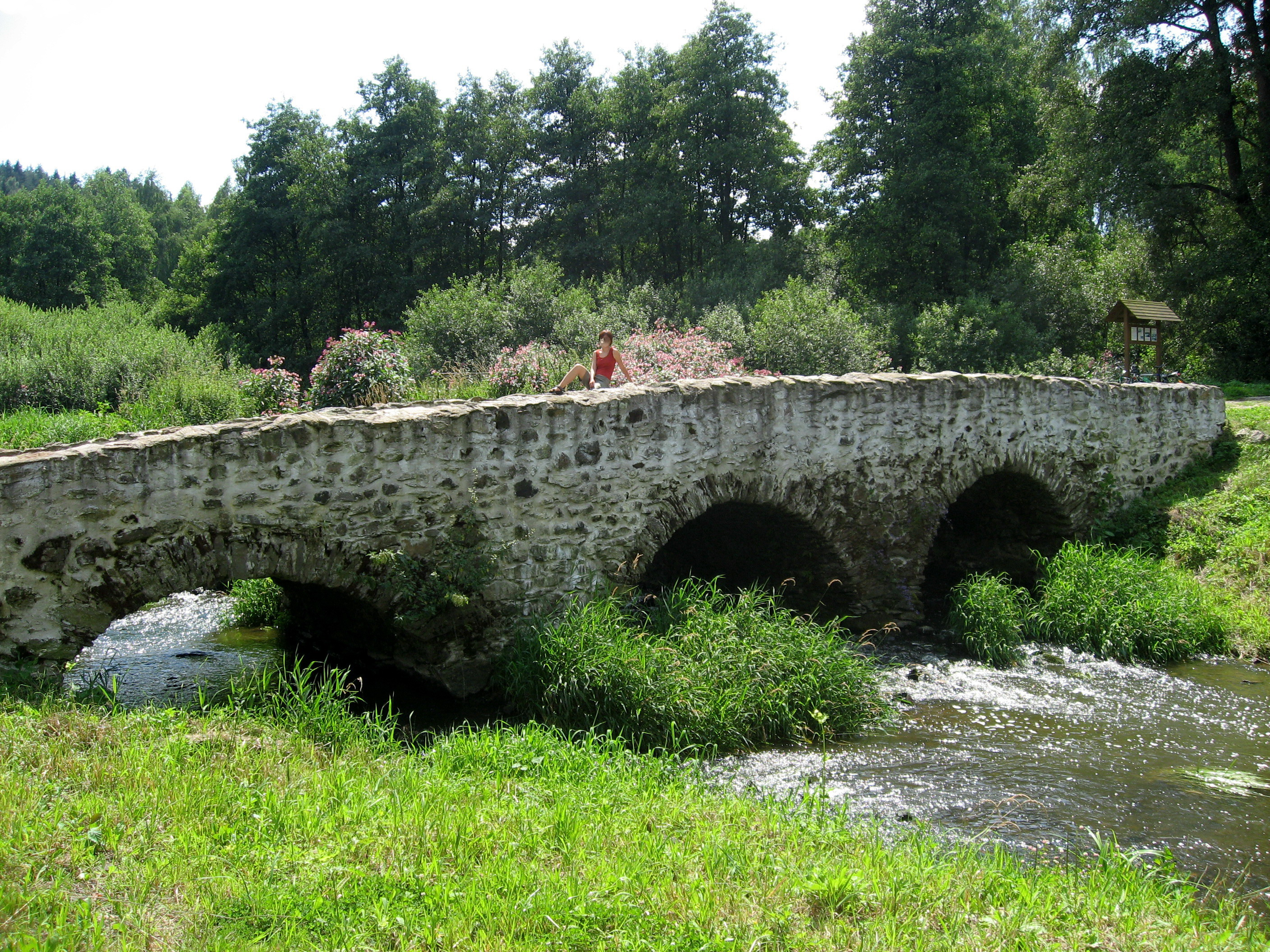 U Lutriána, někdy též zvaný Za Lutriánem, je tříobloukový středověký kamenný most přes říčku Šlapanku